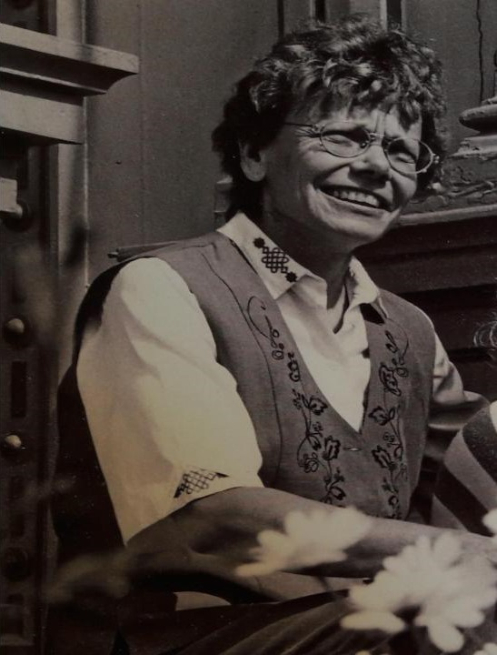 Hilkka Lehtonen